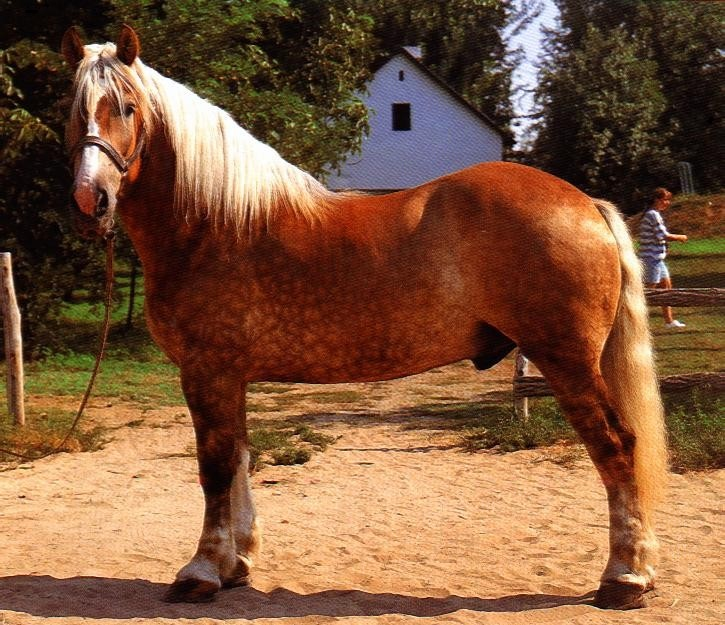 (šlesvik)